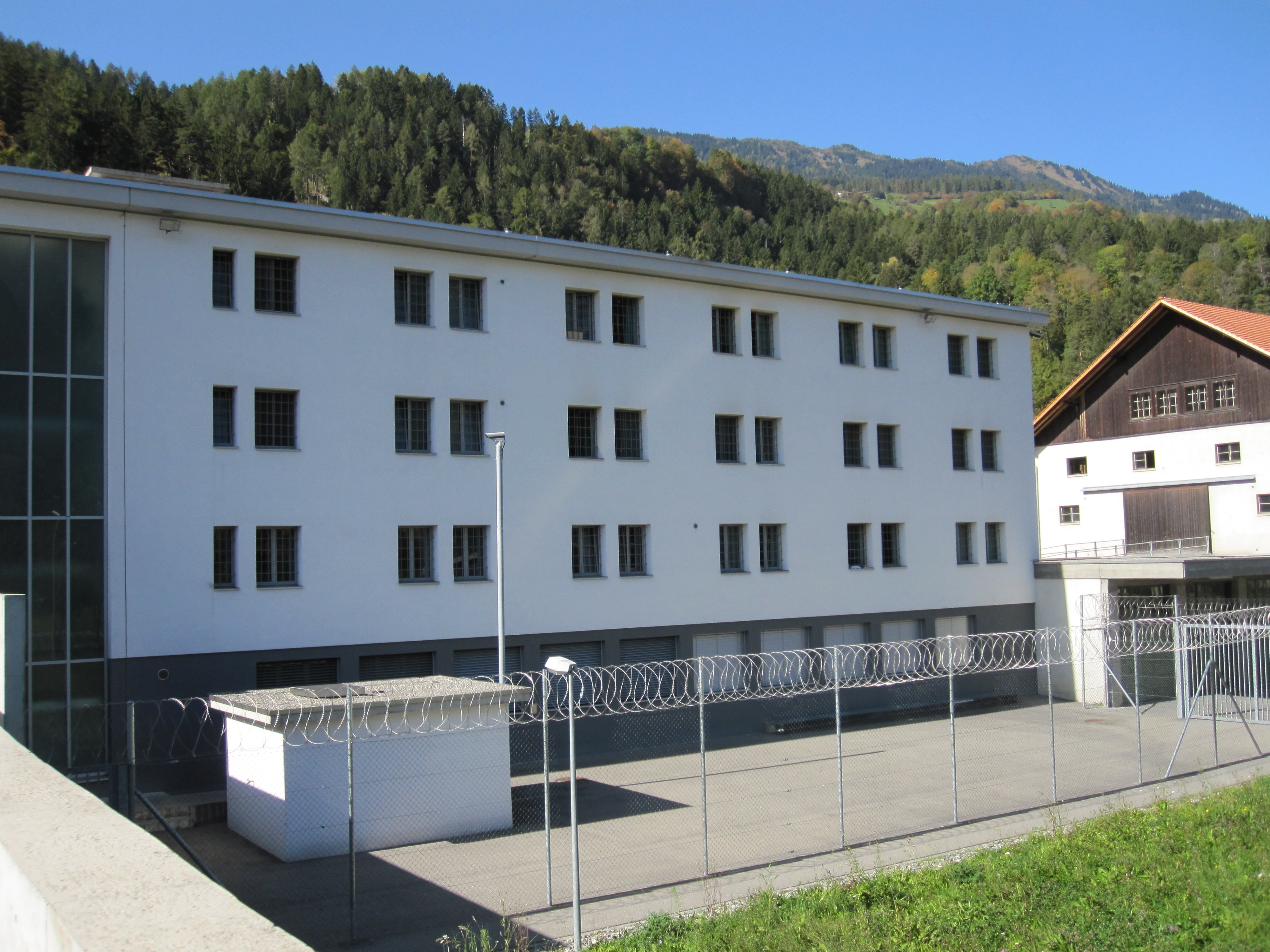 Strafanstalt Realta bei Cazis (Kanton Graubünden)